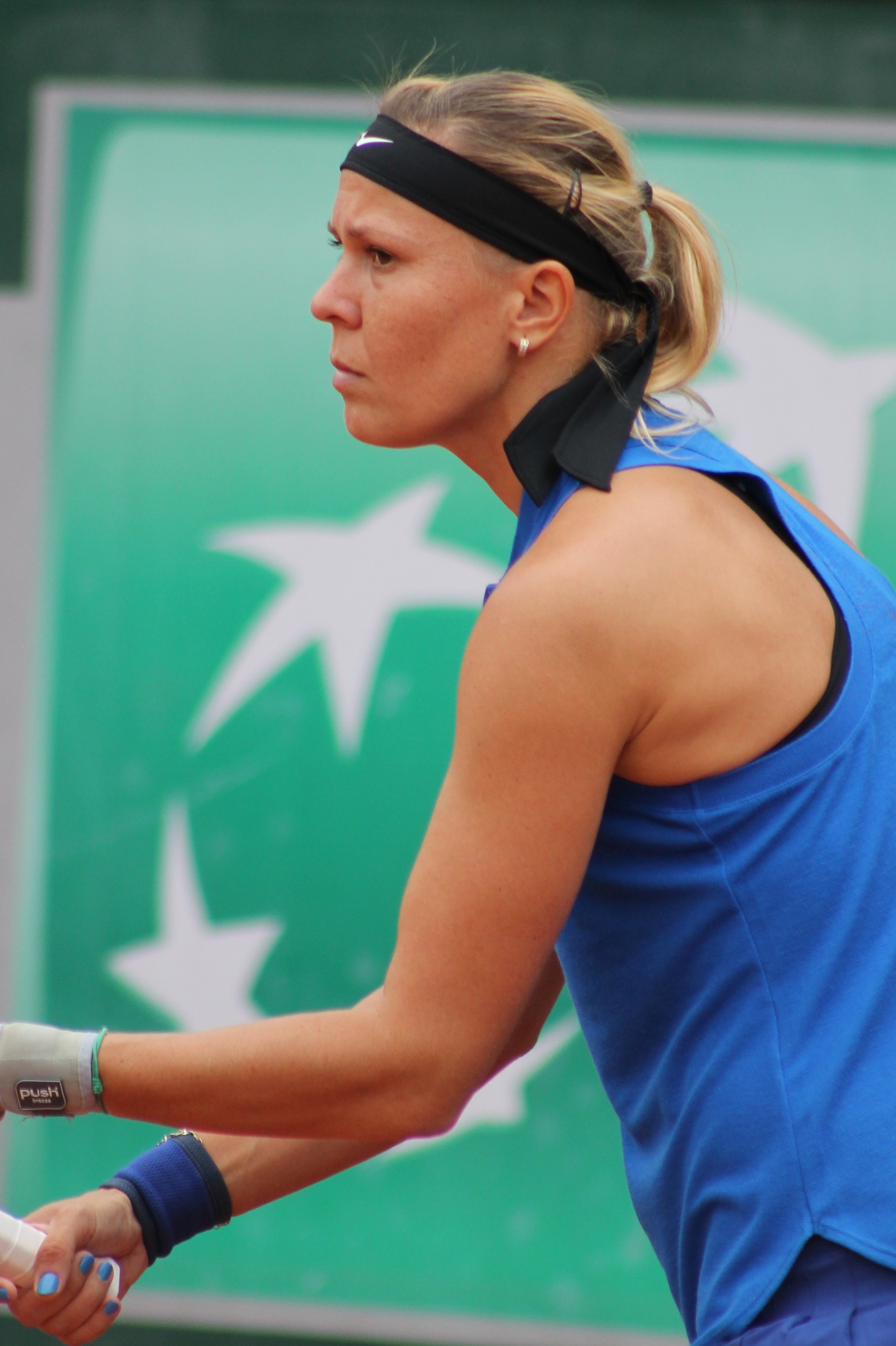 Hradecka RG16 (5)